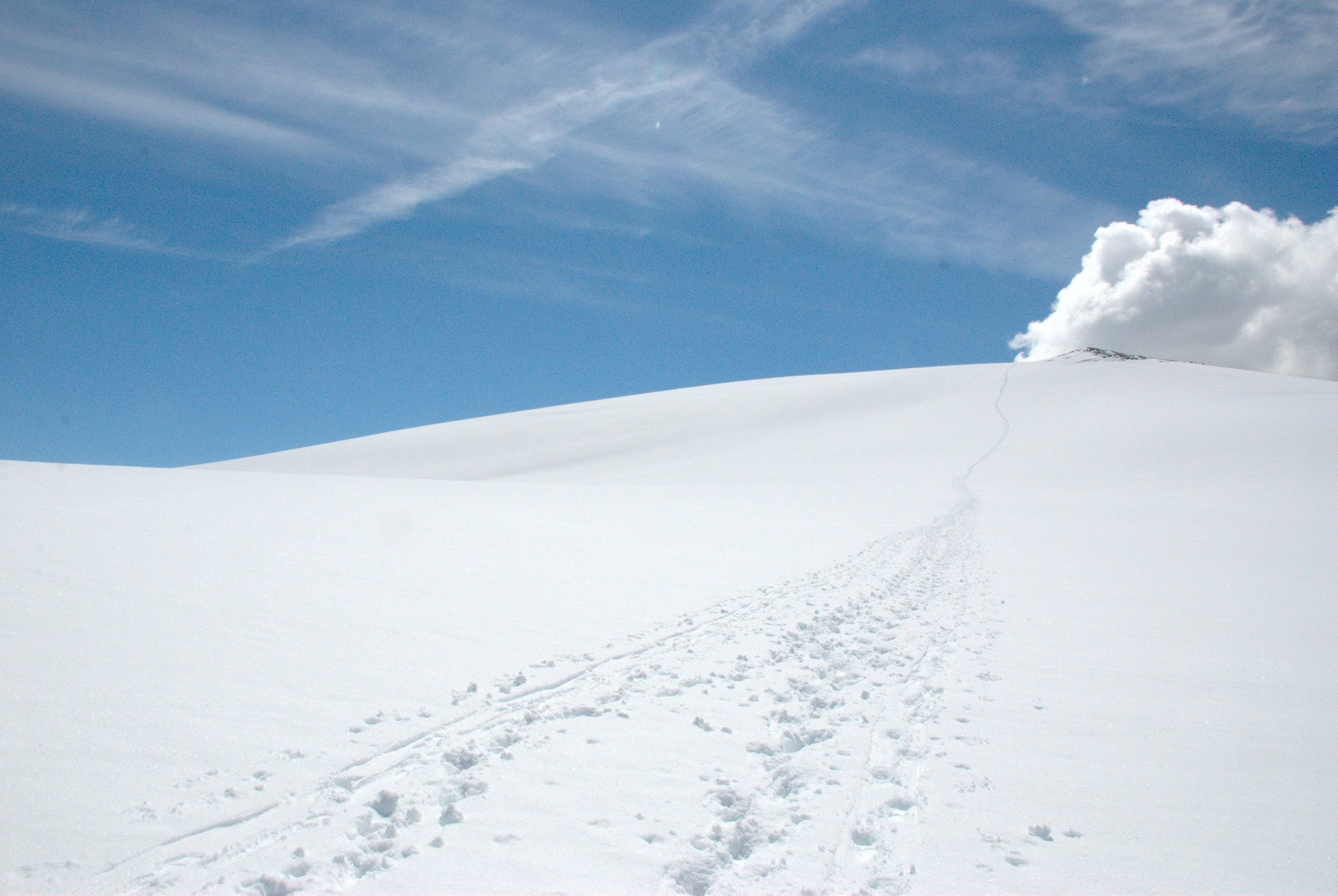 Tystigbreen